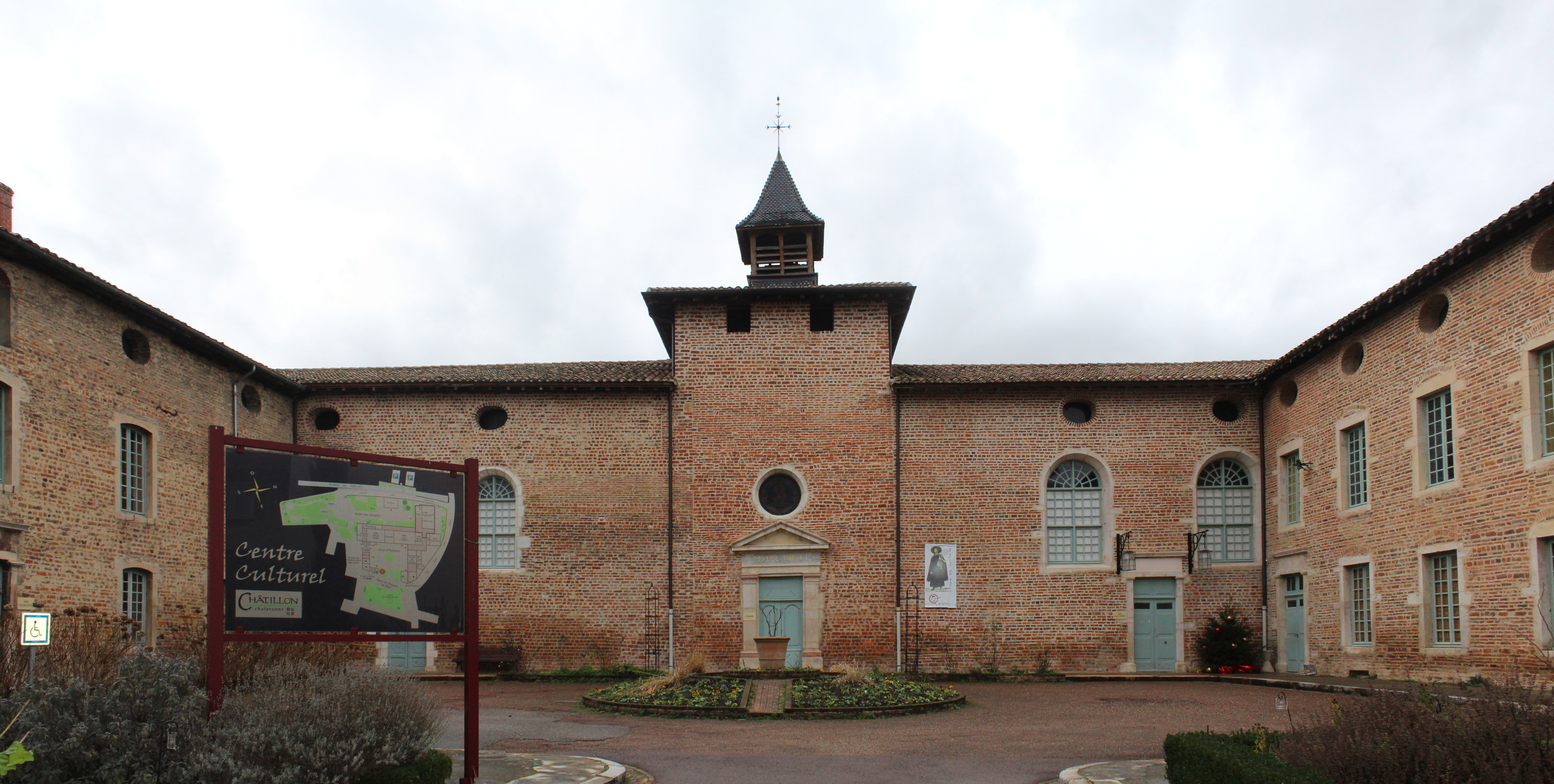 Hospice de Châtillon-sur-Chalaronne.